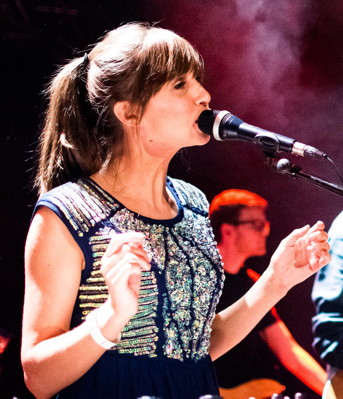 Liza und Kay bei einem Auftritt im Hamburger Musikclub Uebel und Gefährlich im Januar 2016.